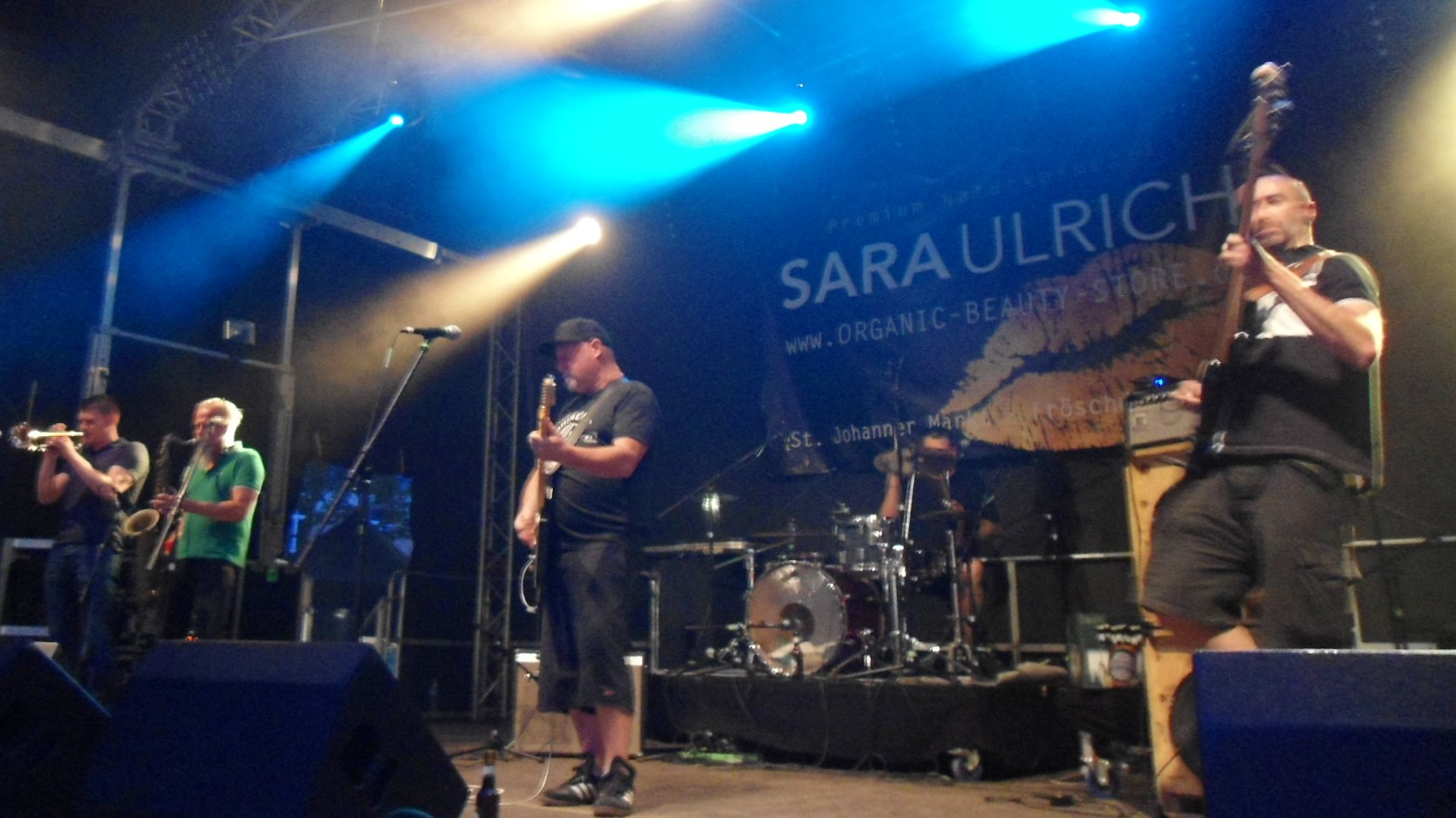 The Toasters in Saarbrücken (Nauwieser Fest) 2017